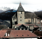 Otsagiko eliza